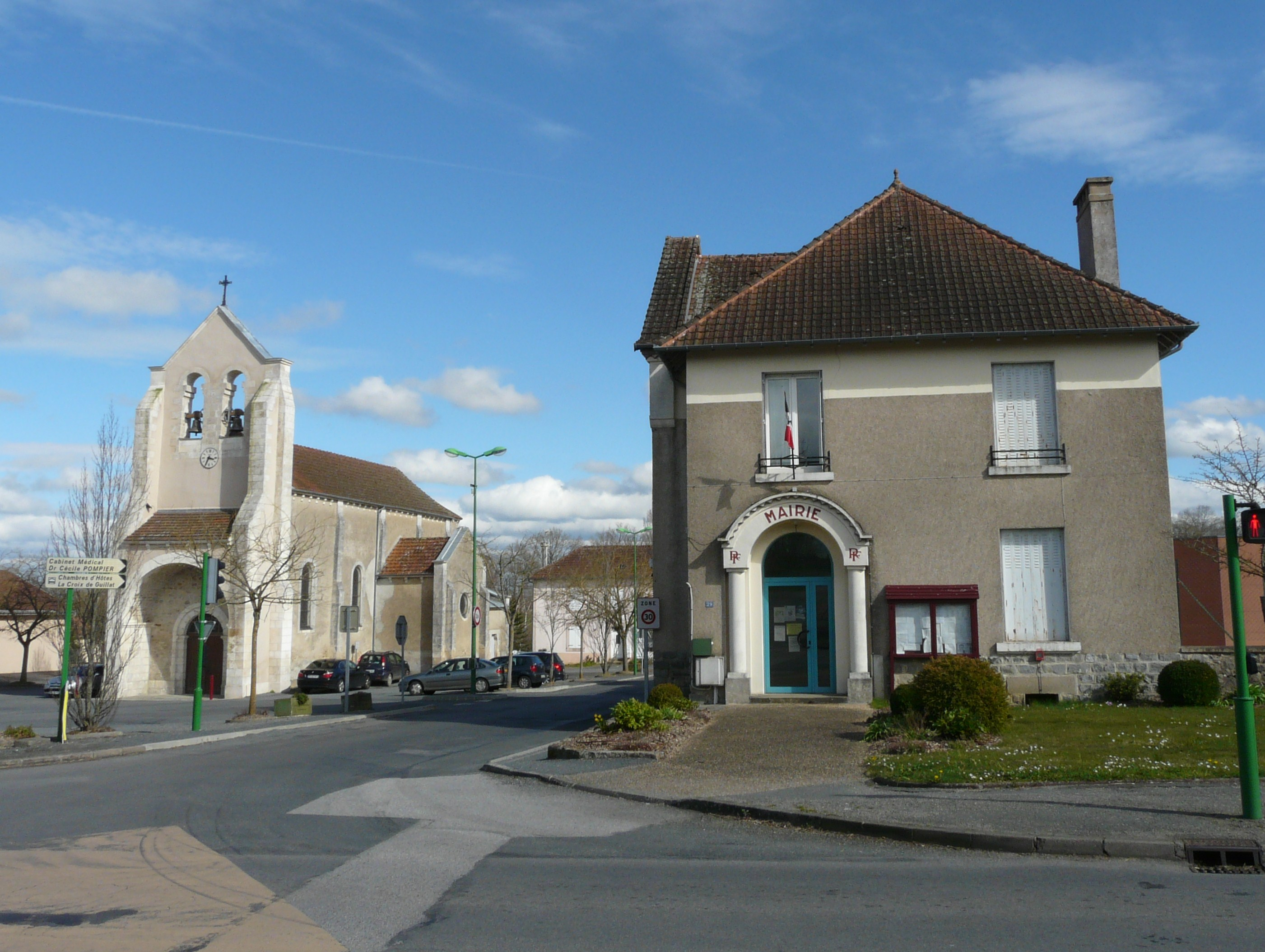 L'église et la mairie de Saint-Maurice-les-Brousses, Haute-Vienne, France.